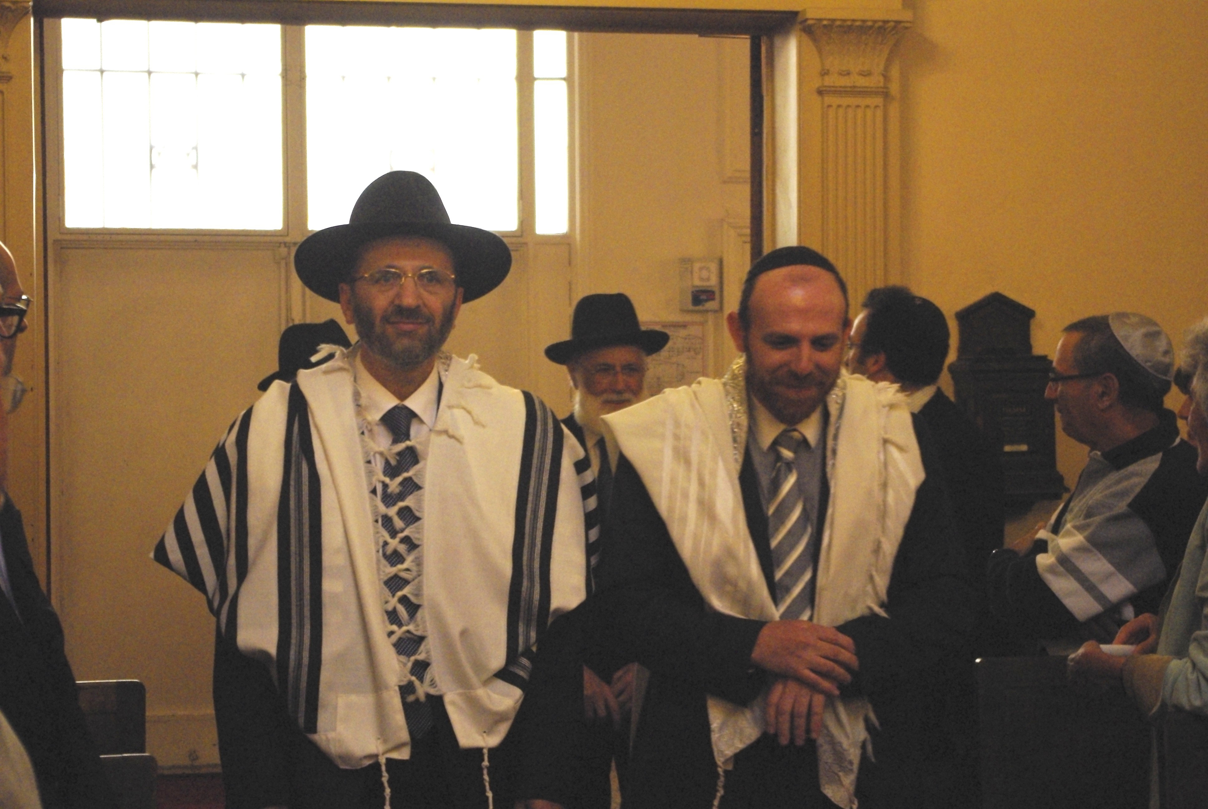 Le grand rabbin de France Gilles Bernheim à l'intronisation du nouveau rabbin de Neuilly Michael Azoulay